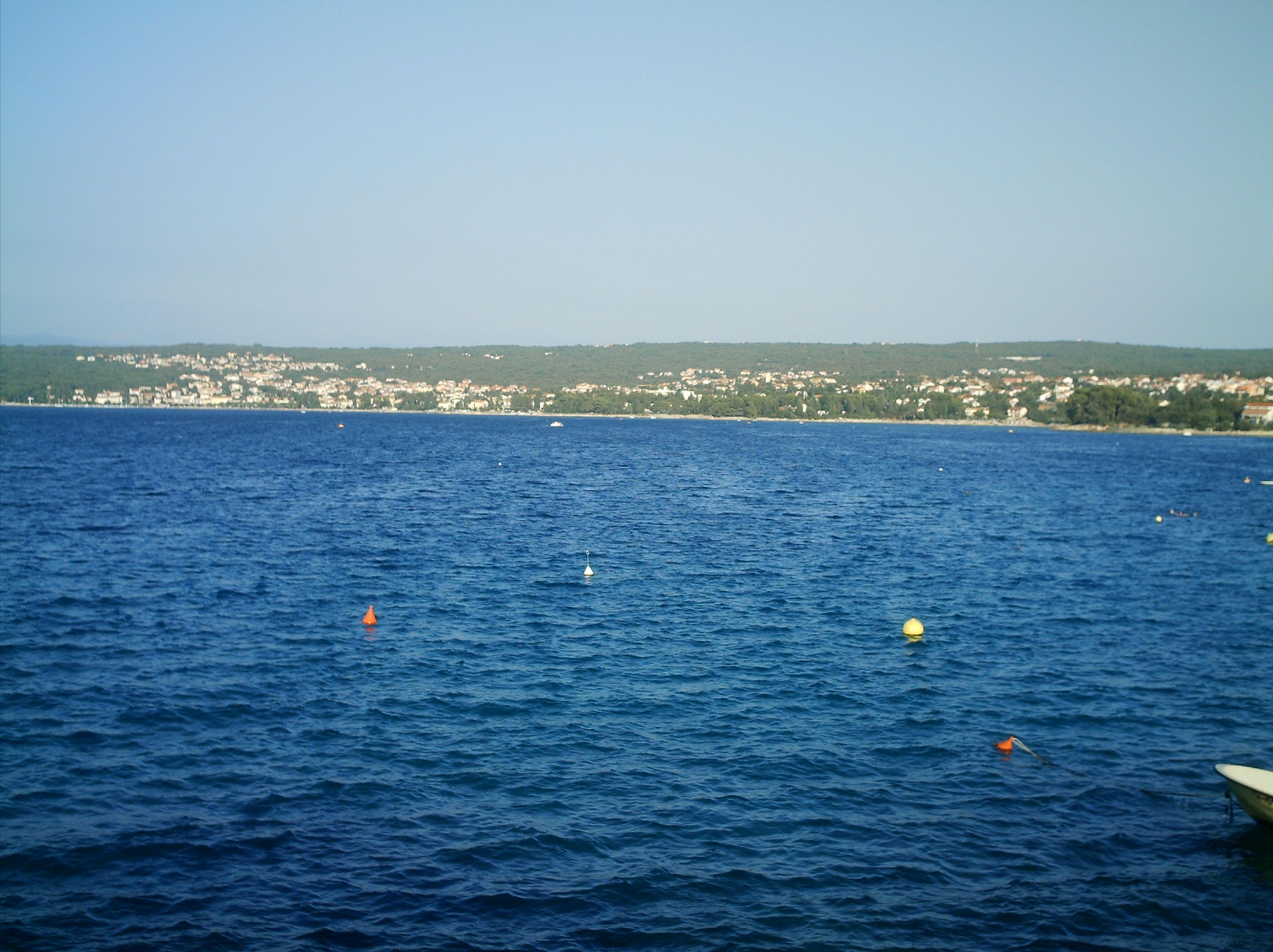 malinska